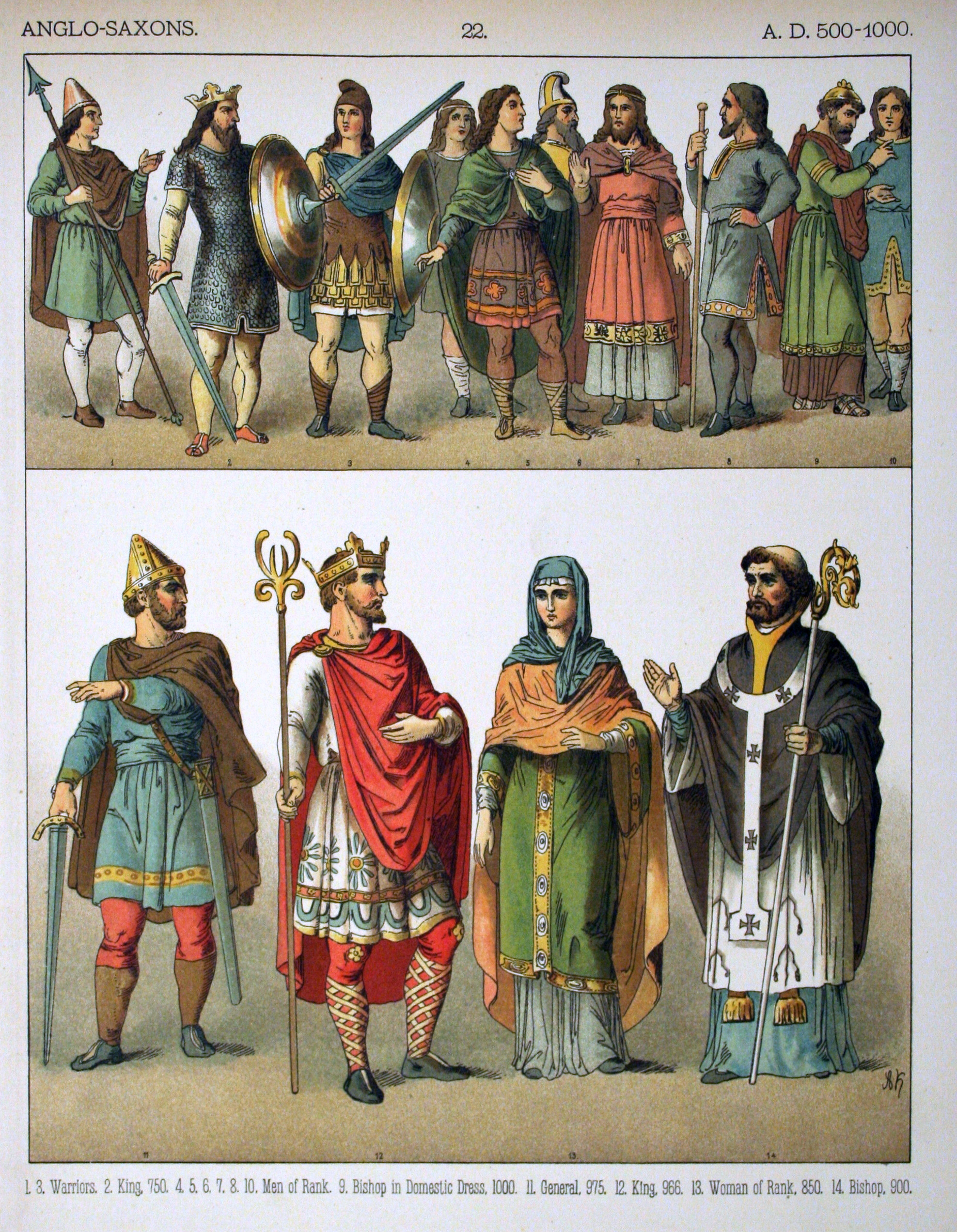 A.D. 500-1000, Anglo-Saxons